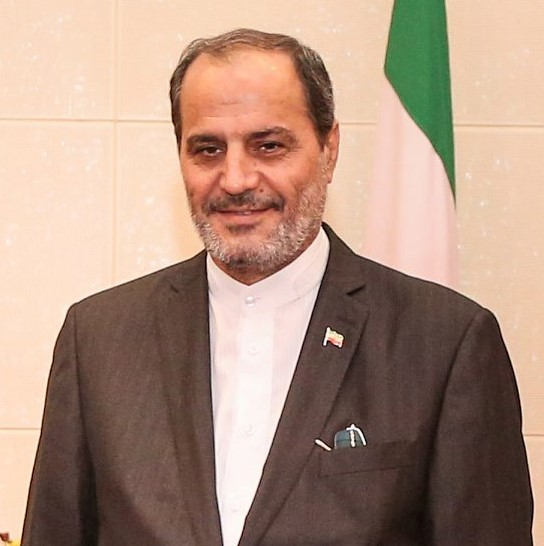 2020-02-20 Mohammad Khosh Heikal Azad, iranischer Botschafter in Osttimor